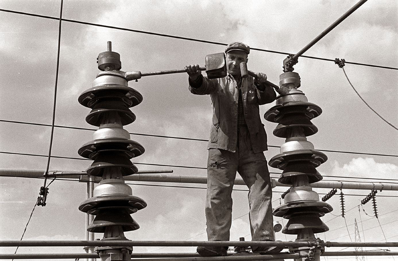 Delavec Elektra Maribor pri popravilu